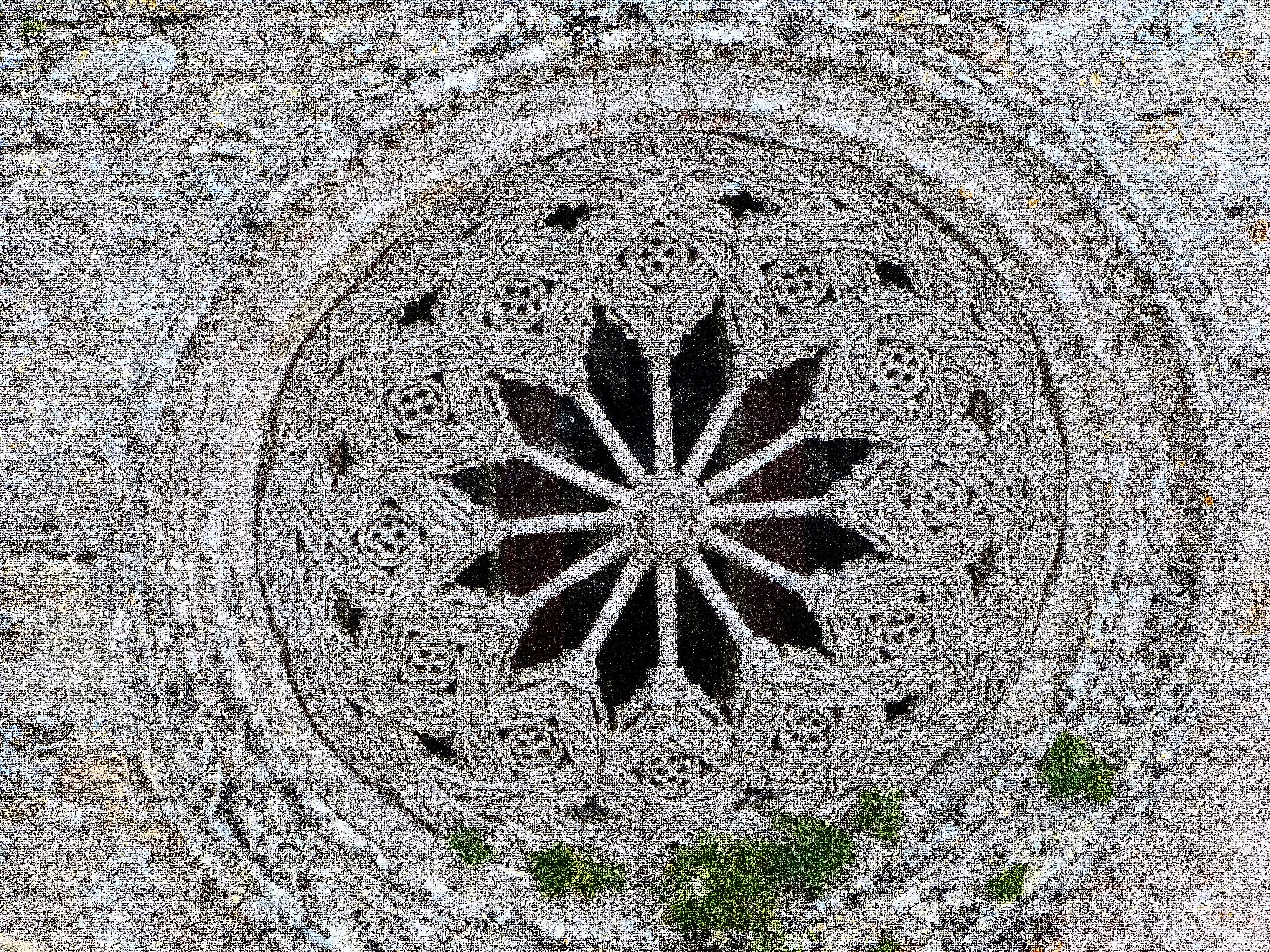 Rosette am Dom von Erice